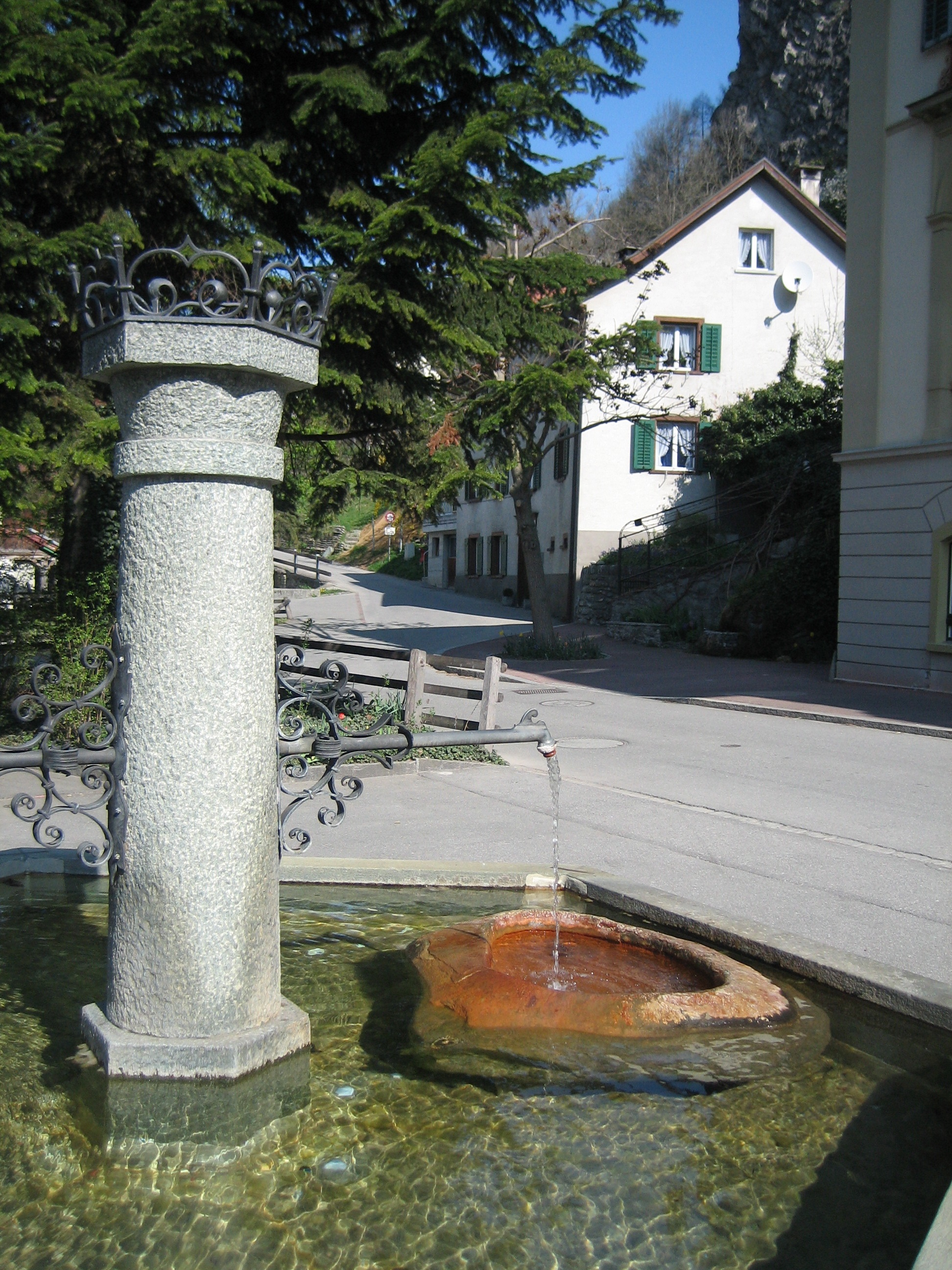 Der rote Brunnen in Rothenbrunnen